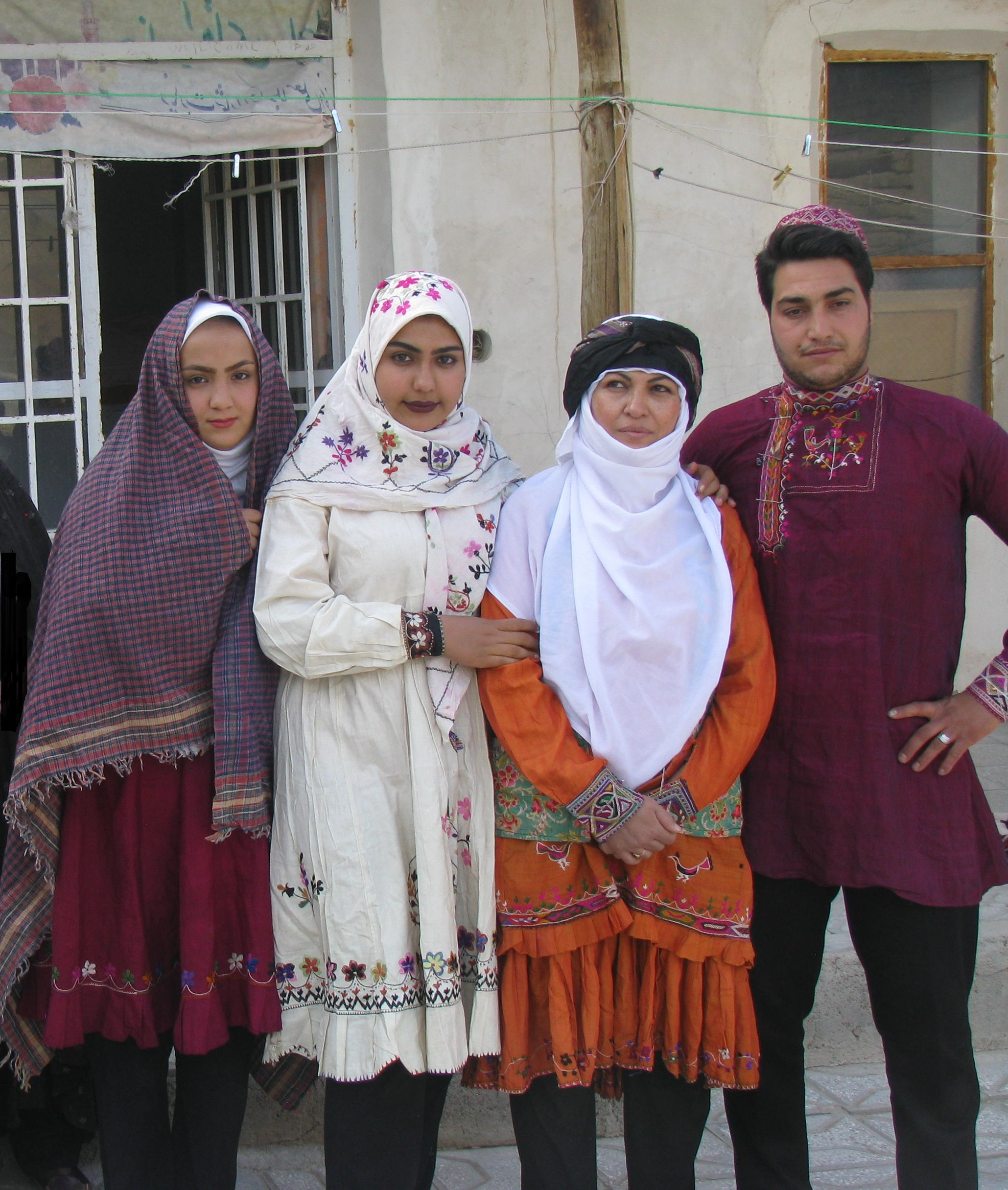 جامۀ سنتی رودمهجنی